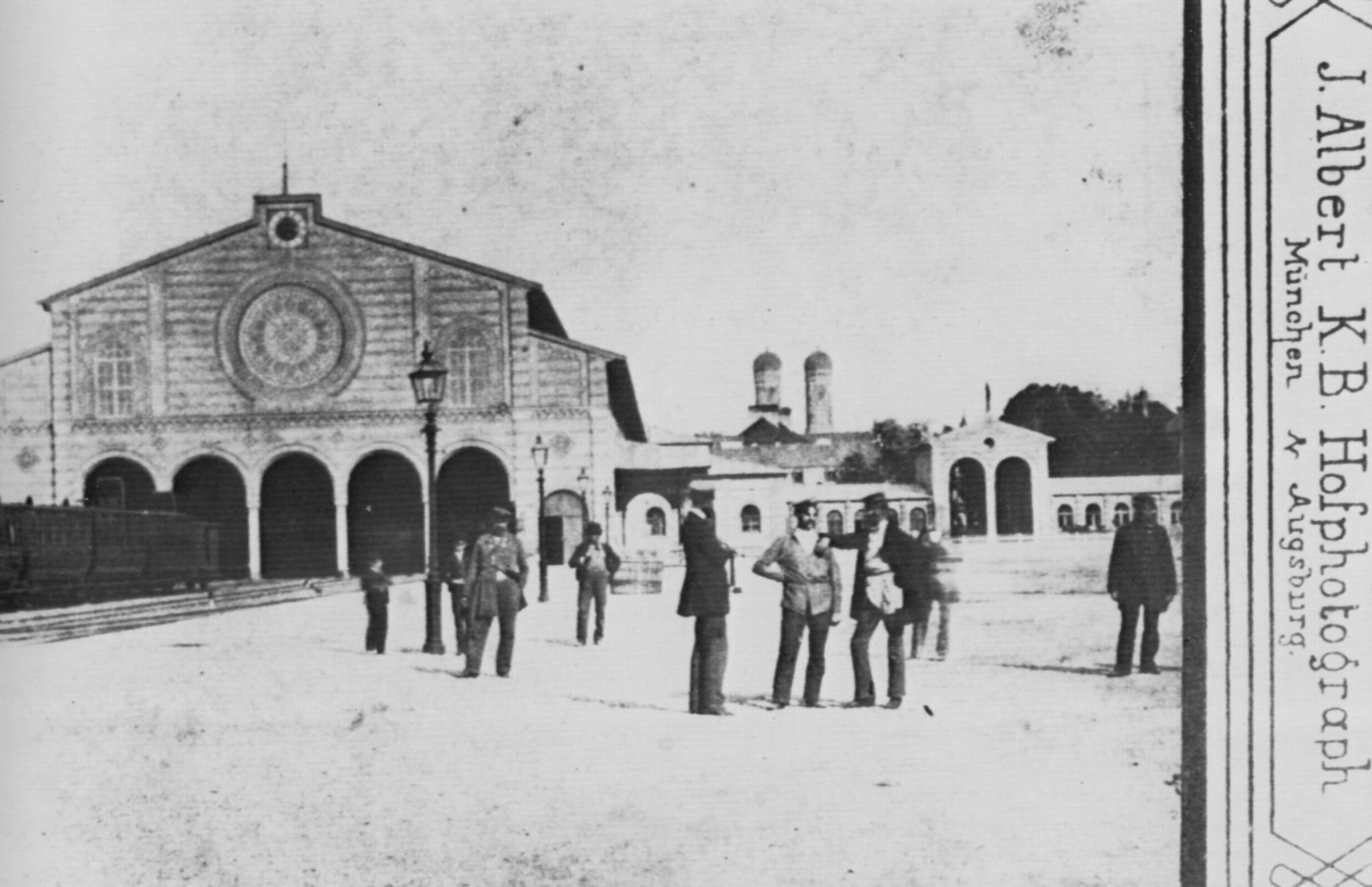 Der Münchner Hauptbahnhof von Westen